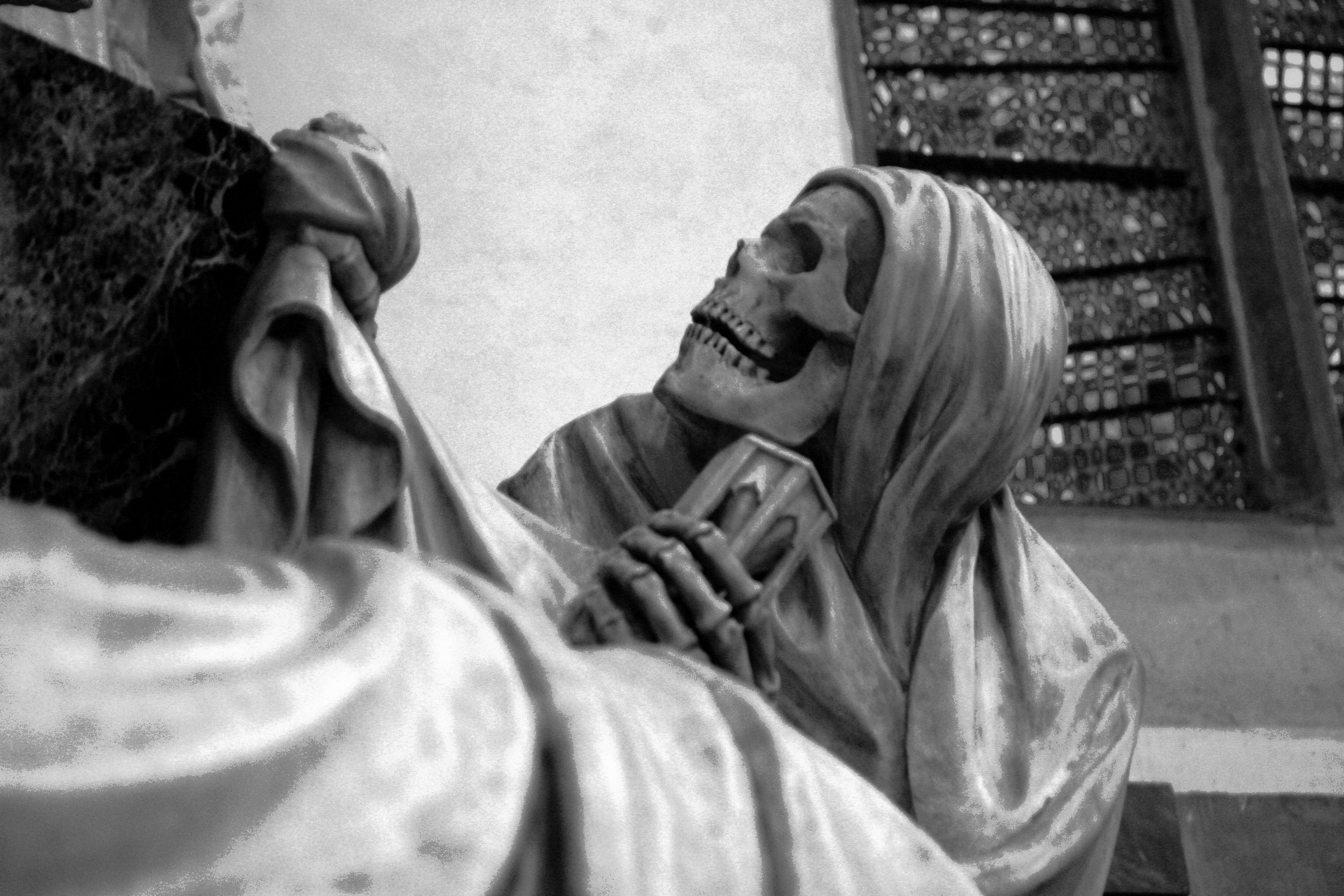 la Mort appelant le Maréchal Maurice de Saxe (1696-1750) au tombeau, Église Saint-Thomas, Strasbourg